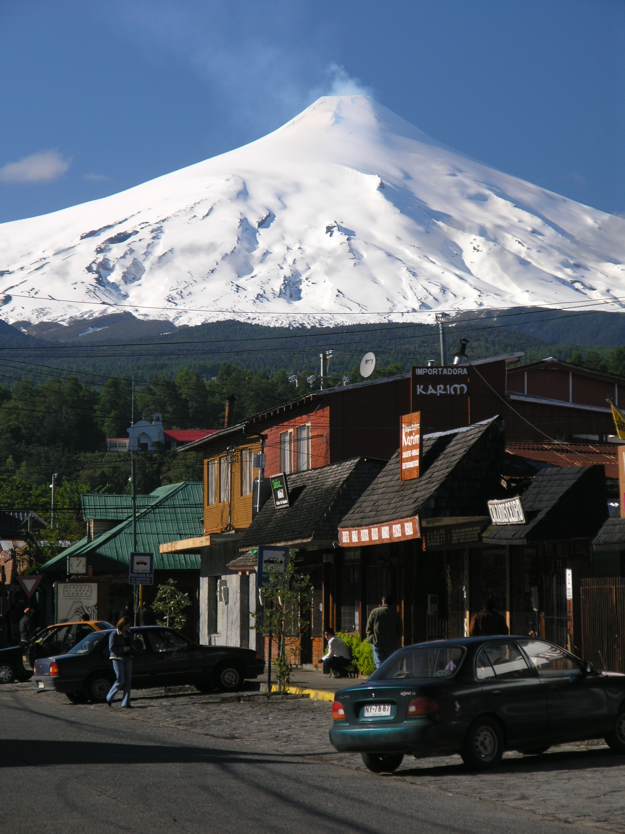 Pucon et son volcan